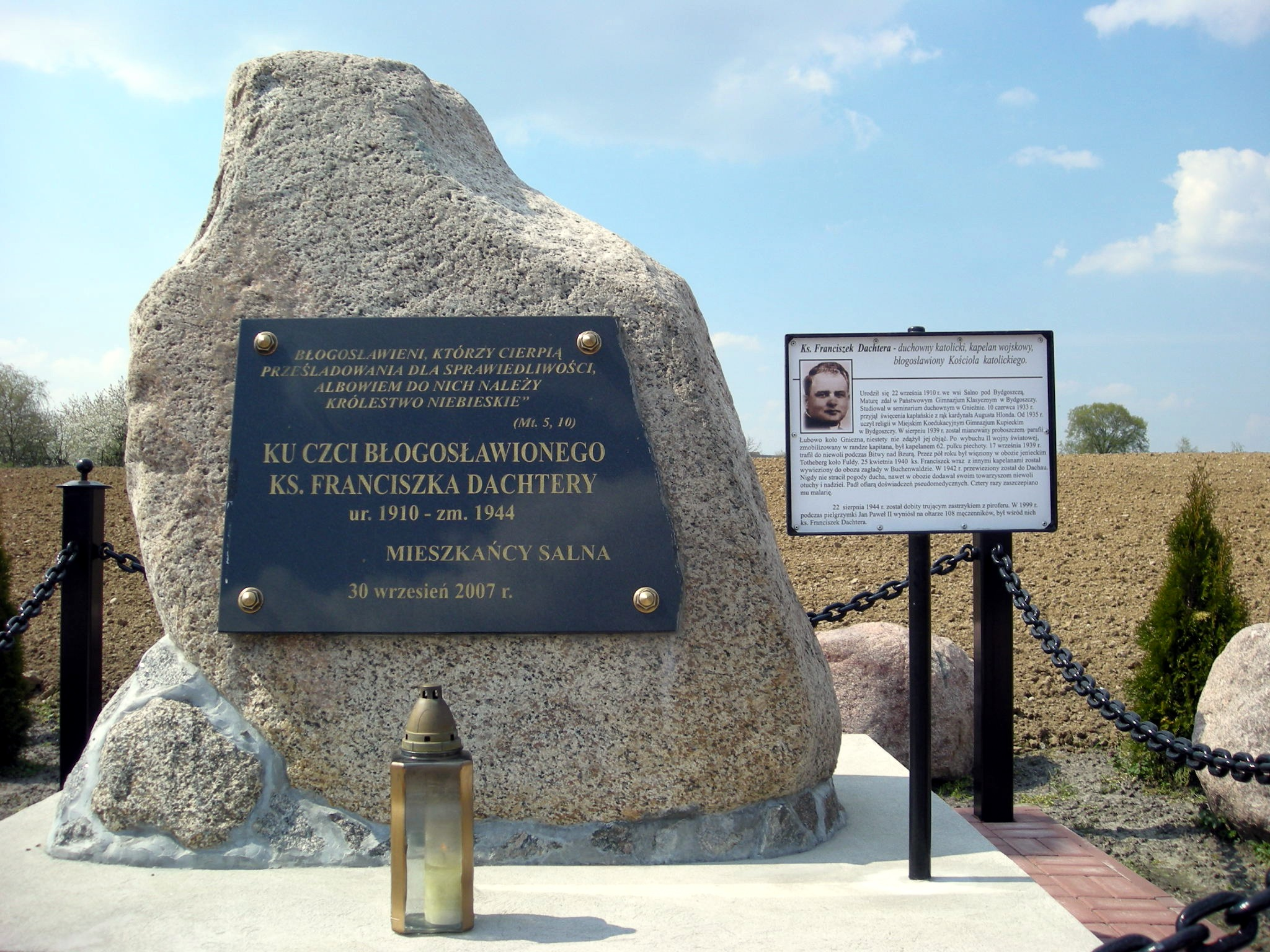 Tablica ku czci błogosławionego ks. Franciszka Dachtery we wsi Salno, woj. kujawsko-pomorskie.